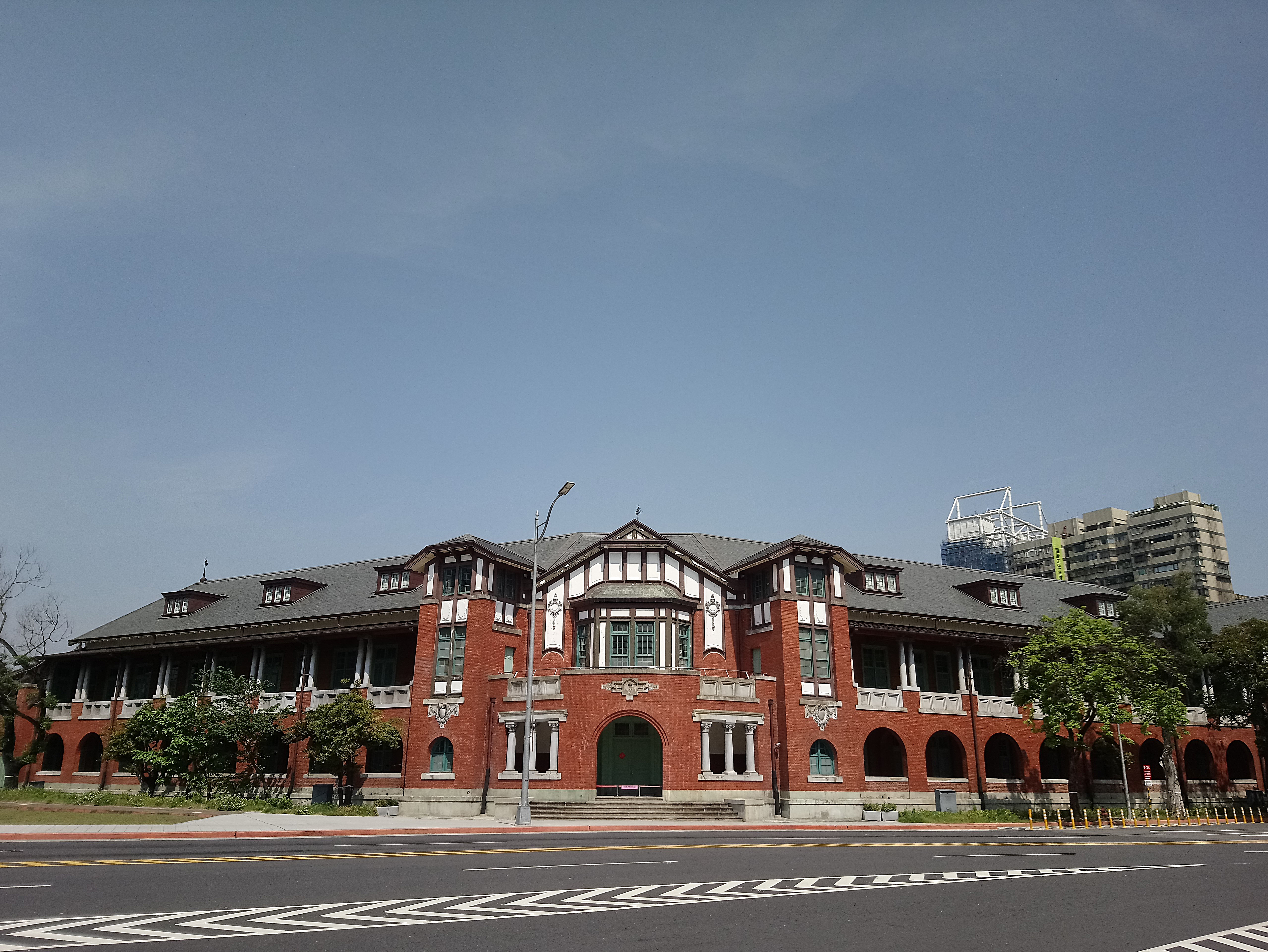 臺灣總督府鐵道部廳舍,臺北市大同區延平次分區玉泉里